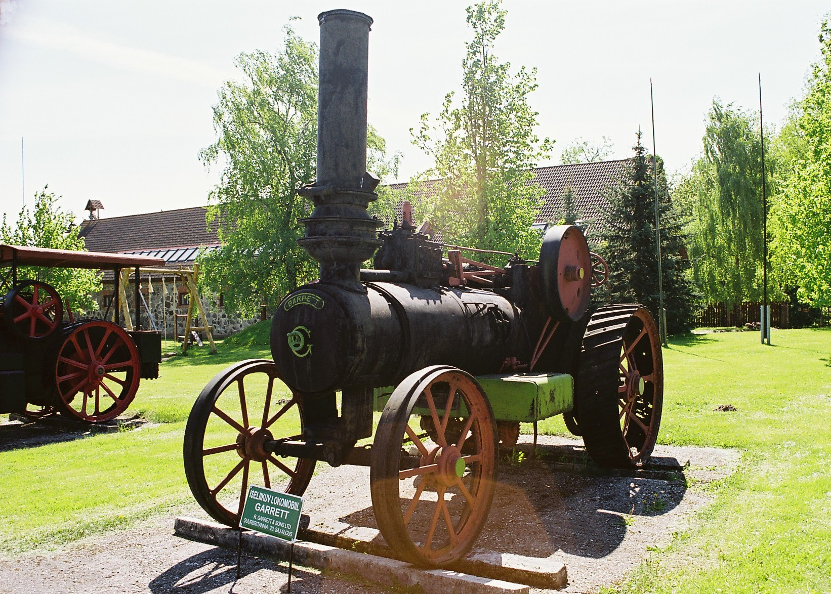 Iseliikuv lokomobiil Garrett, R. Garrett & Sons Ltd.